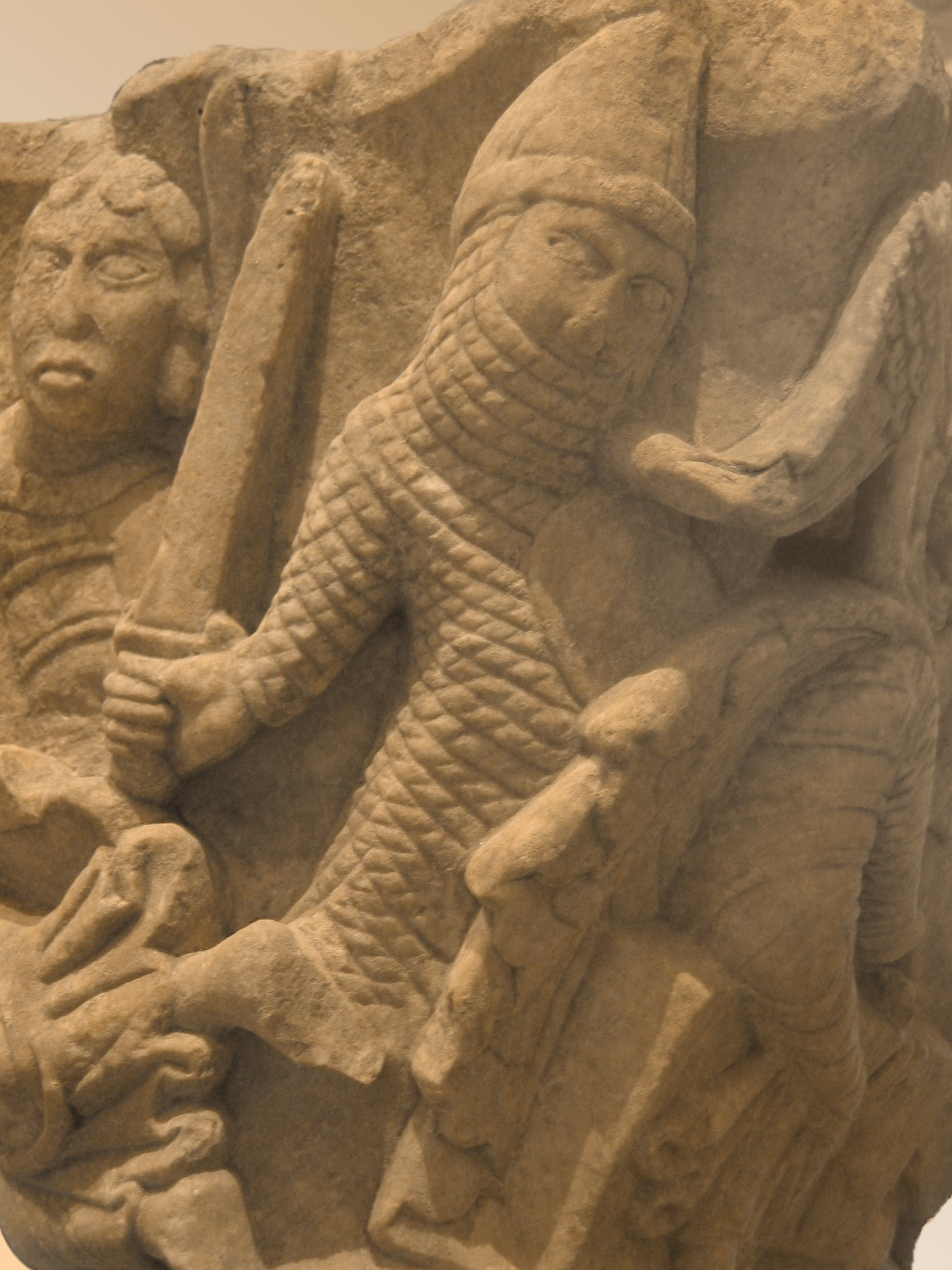 Chevalier en cotte de mailles, chapiteau (Knight on a capital) Location : Musée du Louvre, Paris I took this picture on December 2005